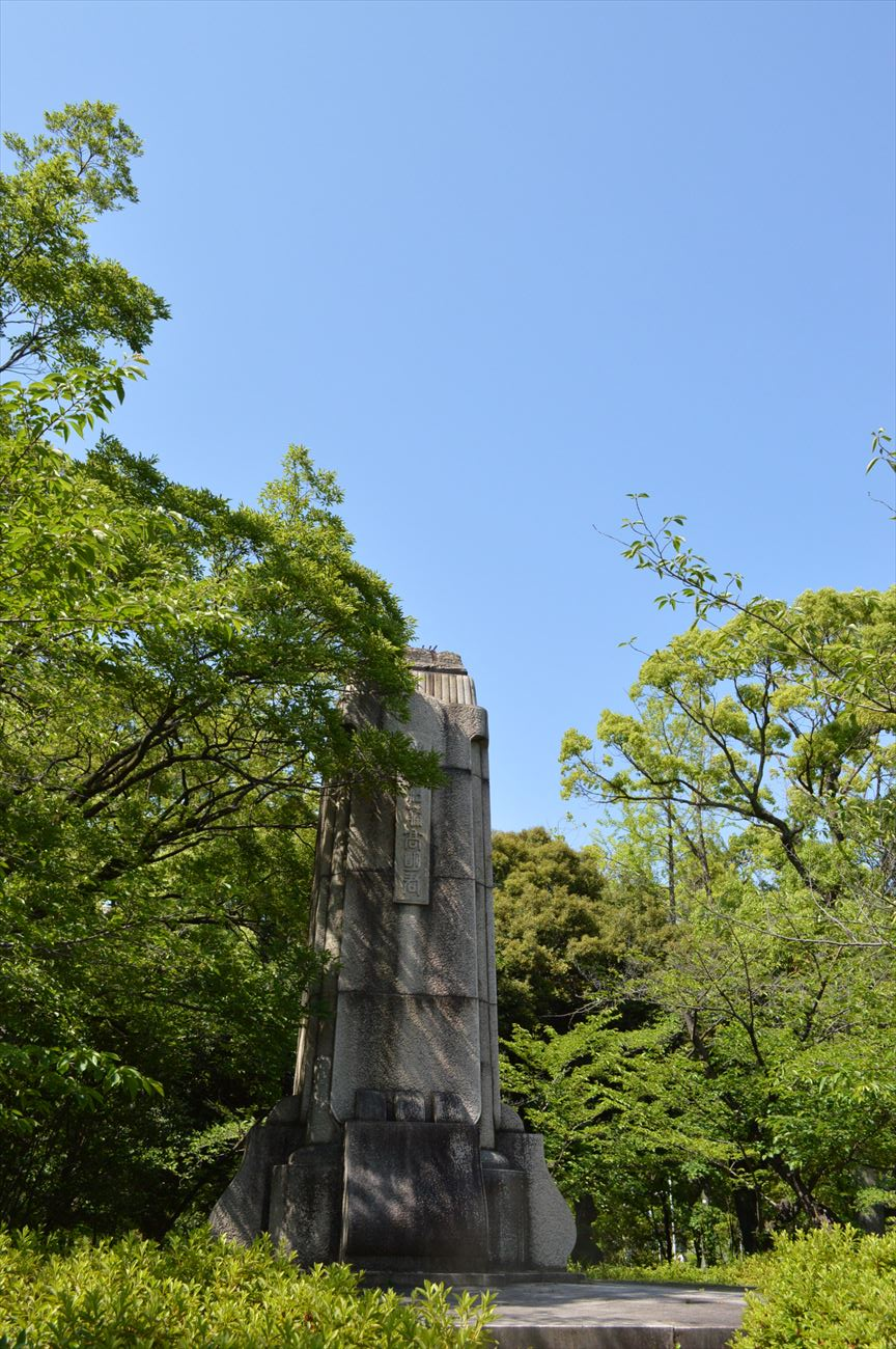 名古屋市の鶴舞公園にある、加藤高明像の台座（元・内閣総理大臣）